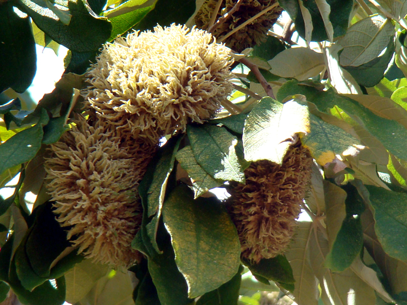 Zeyheria Tuberculosa - Nomes populares: Ipê Felpudo, Bolsa de pastor, Ipê Boia... Imagem obtida em: Seabra-BA, Brasil.